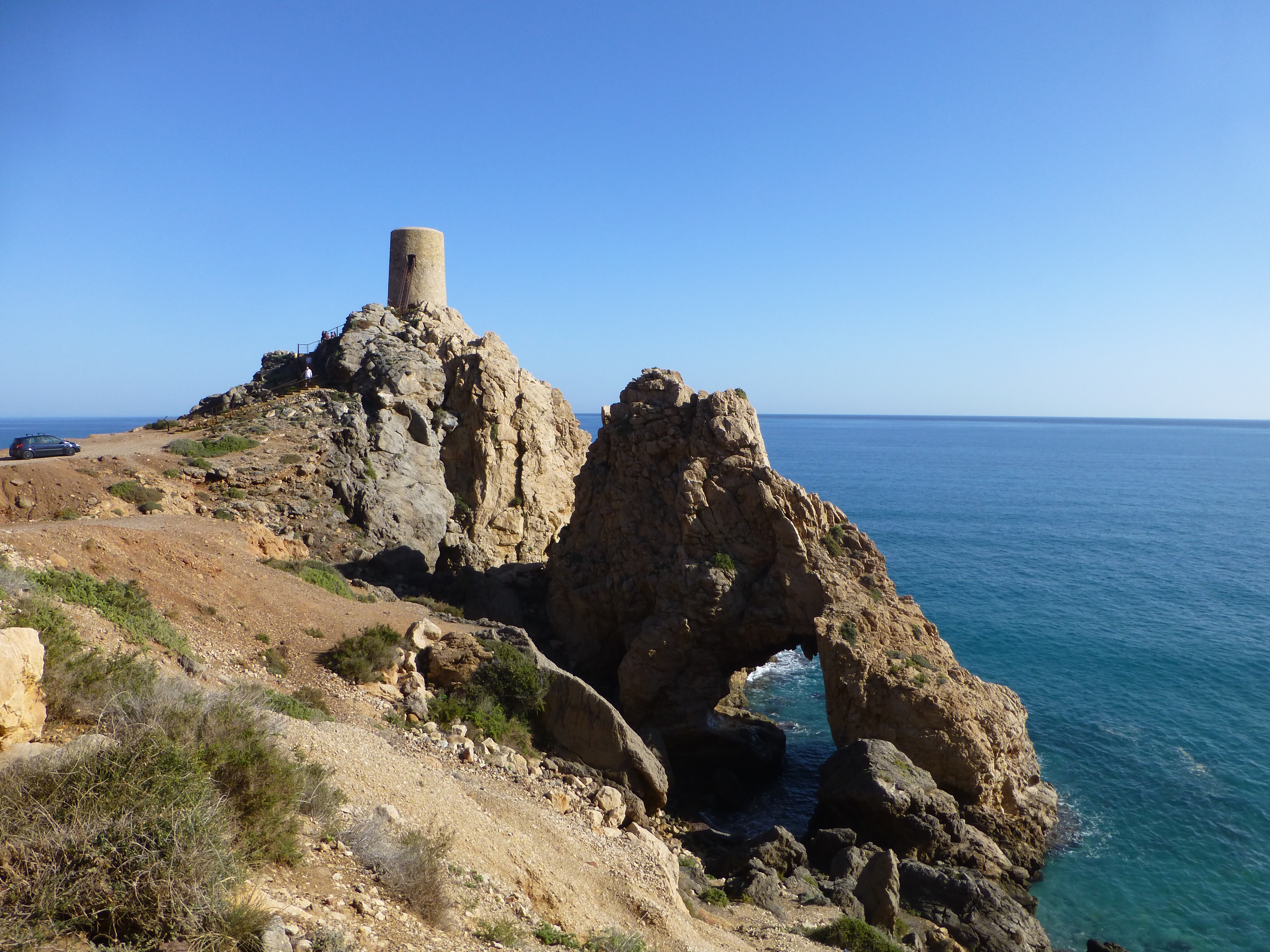 Torre del Pirulico y arco de roca. Mojácar, Almería, Andalucía, España.